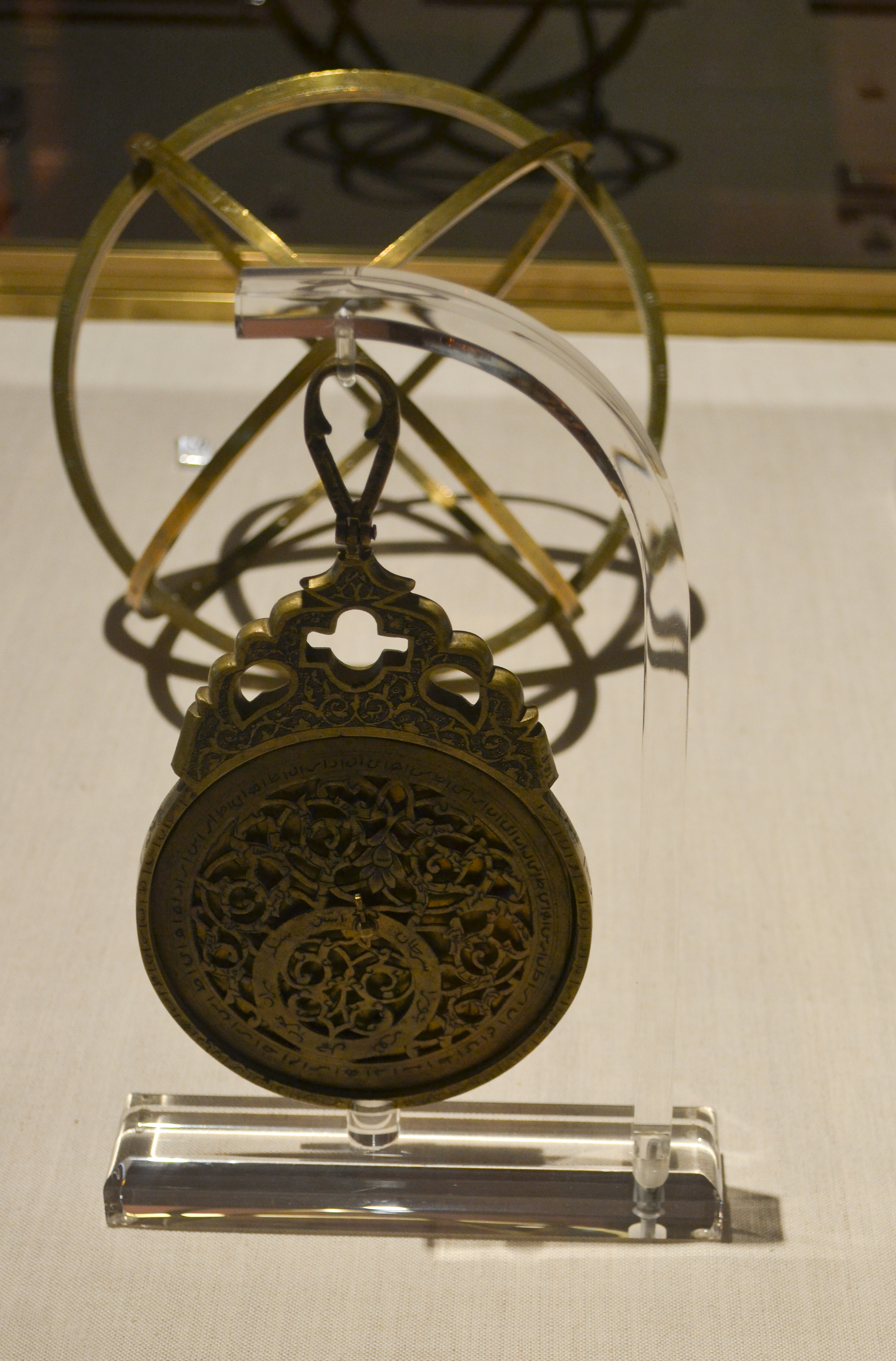 Madre de Astrolabio. Procedencia europea (c. 1570). Museo Naval de Madrid. Nº inv. 1278.